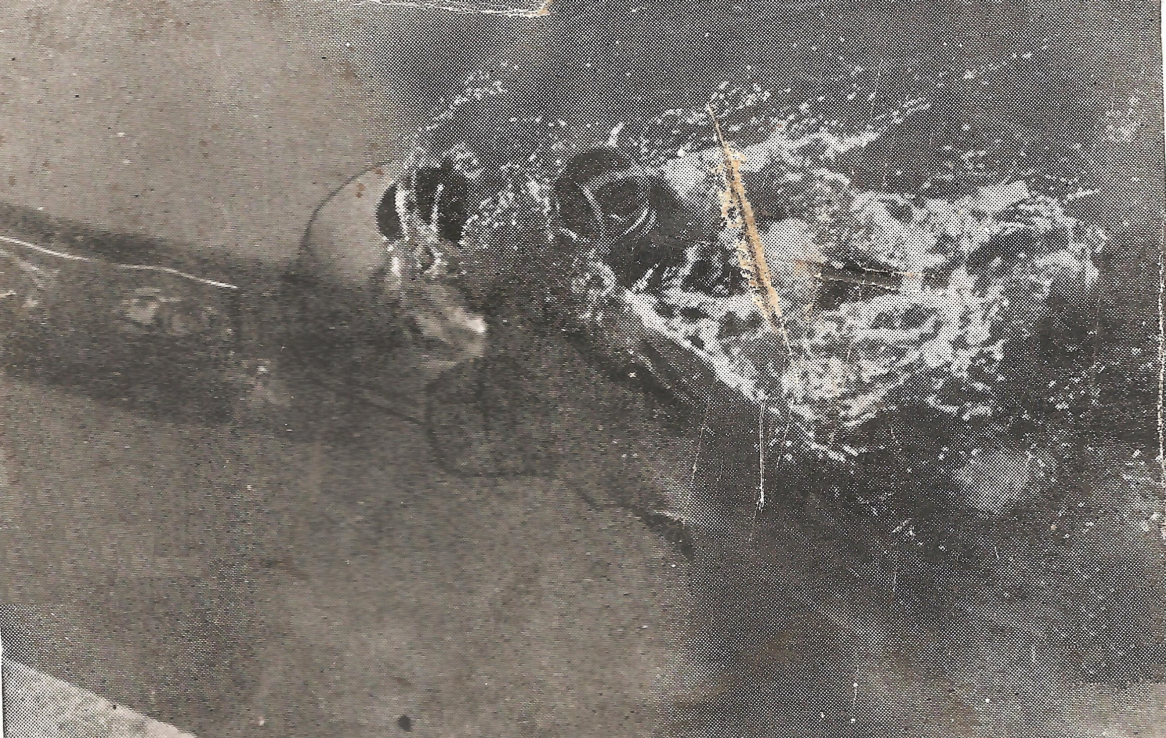 Un Maiale al ataque en 1941